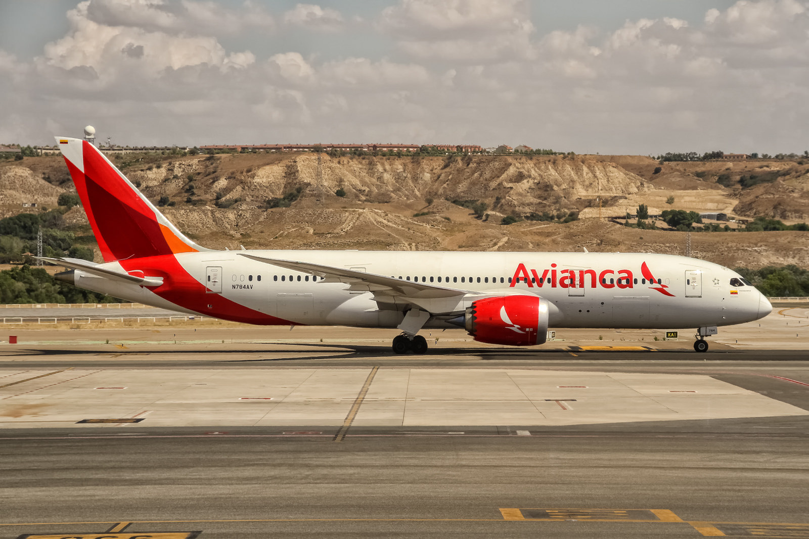 N784AV Avianca Boeing 787-8 Dreamliner departing to Bogota (BIG) @ Madrid - Barajas (MAD) / 22.08.2015